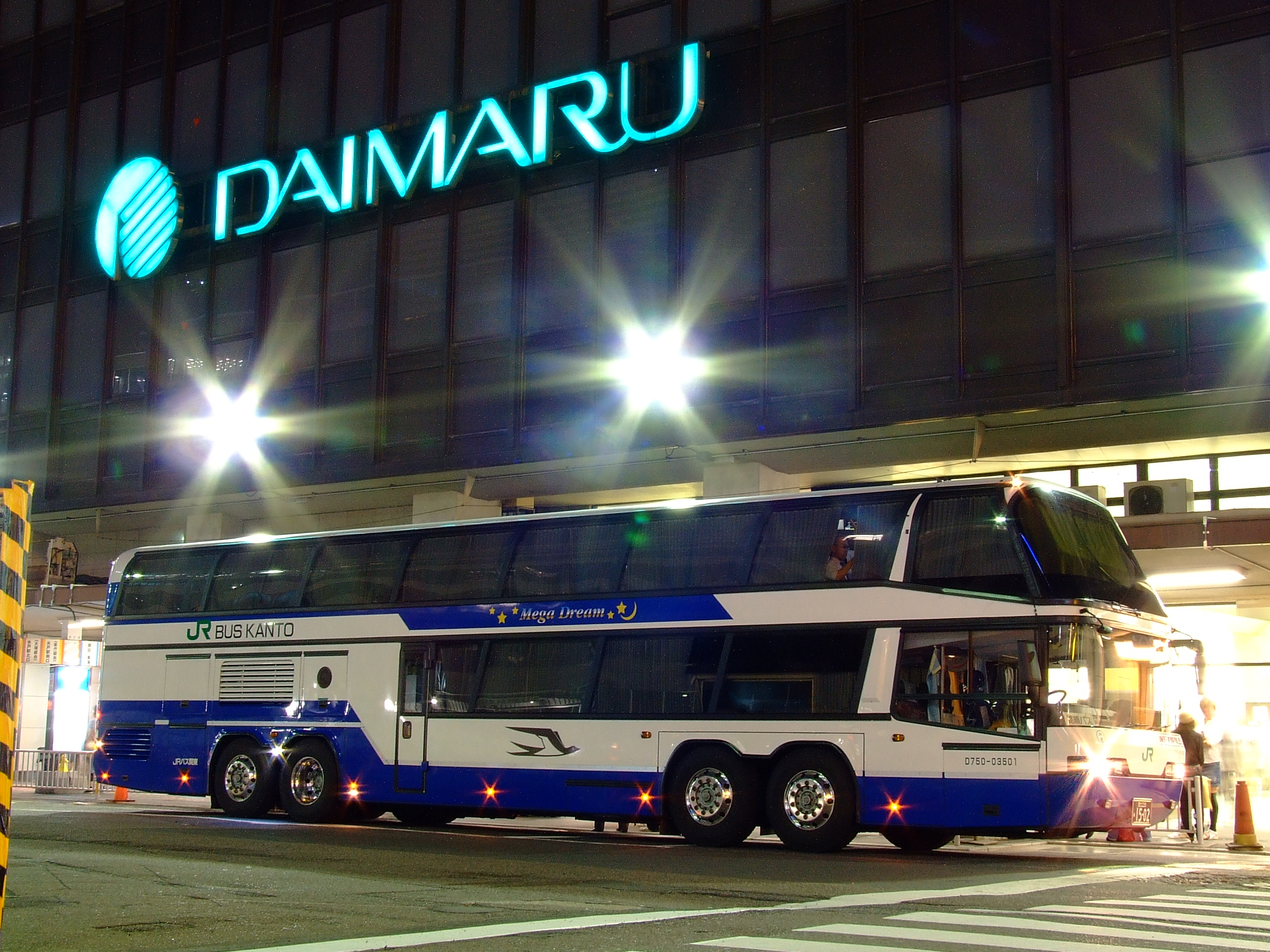 JRバス関東の夜行高速バス「青春メガドリーム号」東京駅にて